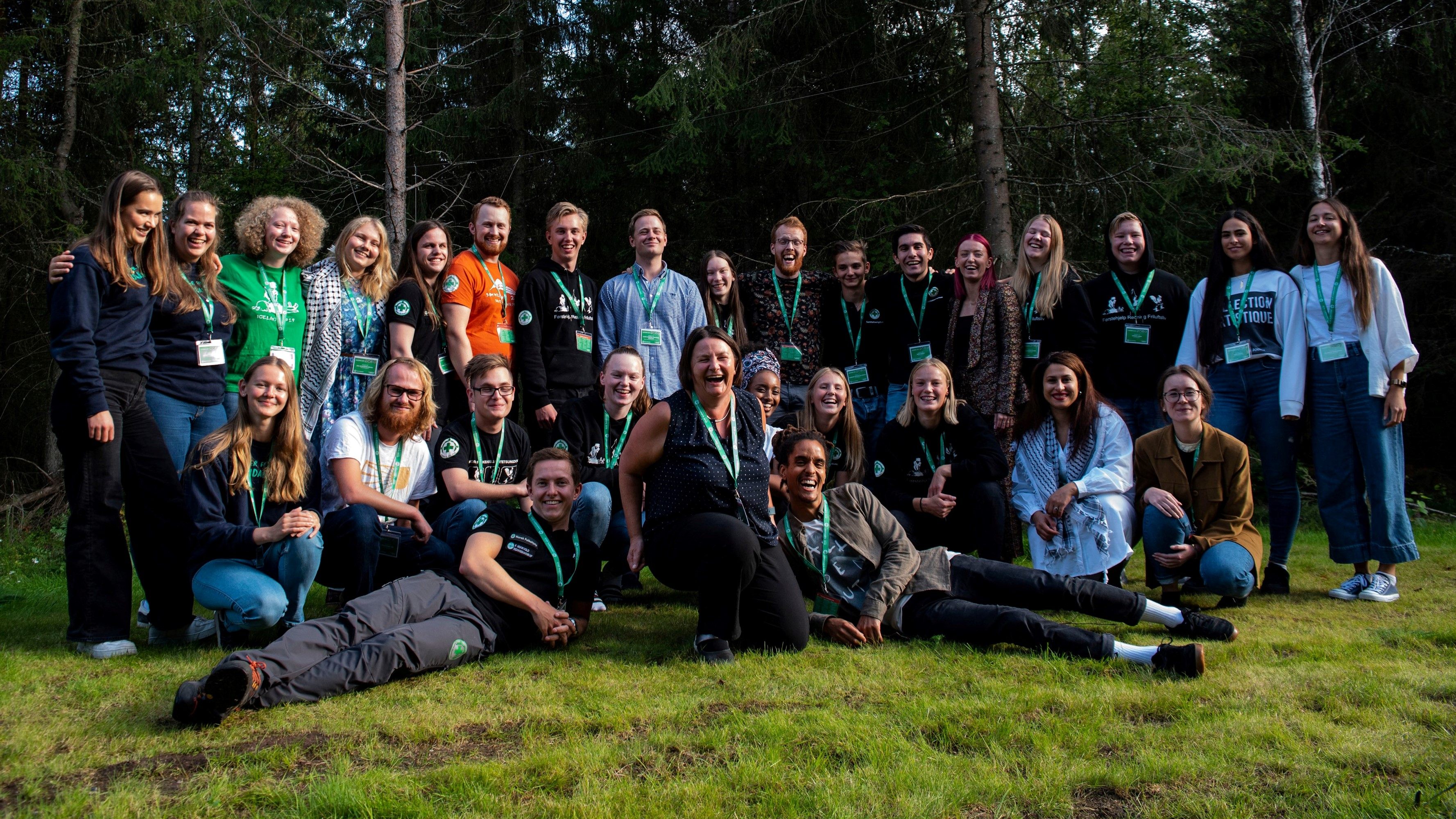 Landsmøtet for Norsk Folkehjelp i 2019. Her er blant annet styret for sanitetsungdommen, sammen med styret i solidaritetsungdommen og generalsekretæren i Norsk Folkehjelp.